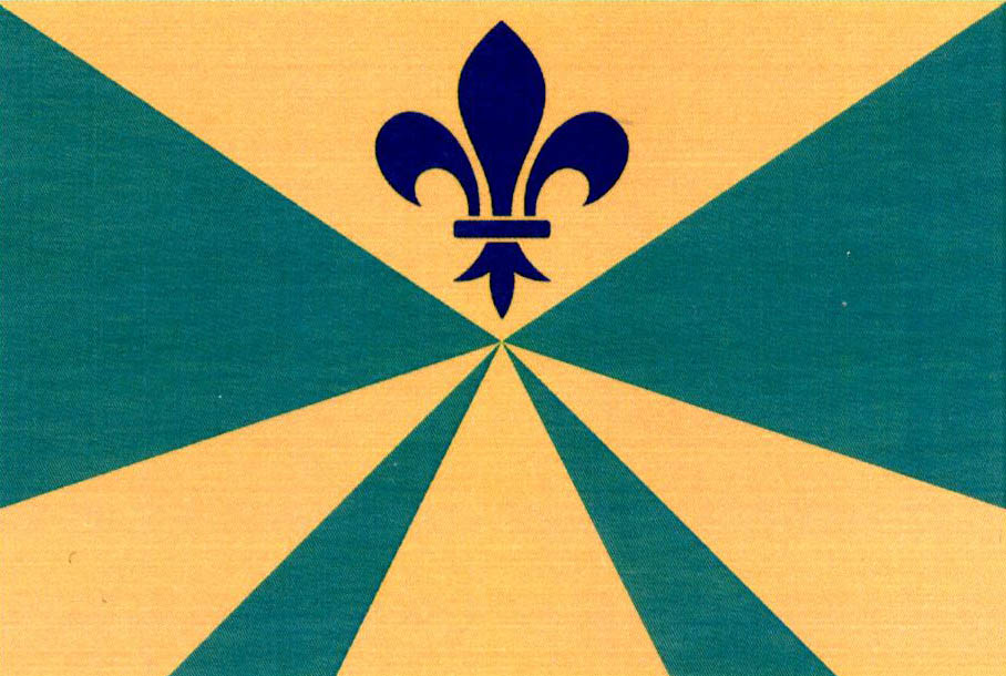 Vlajka obce Klínec